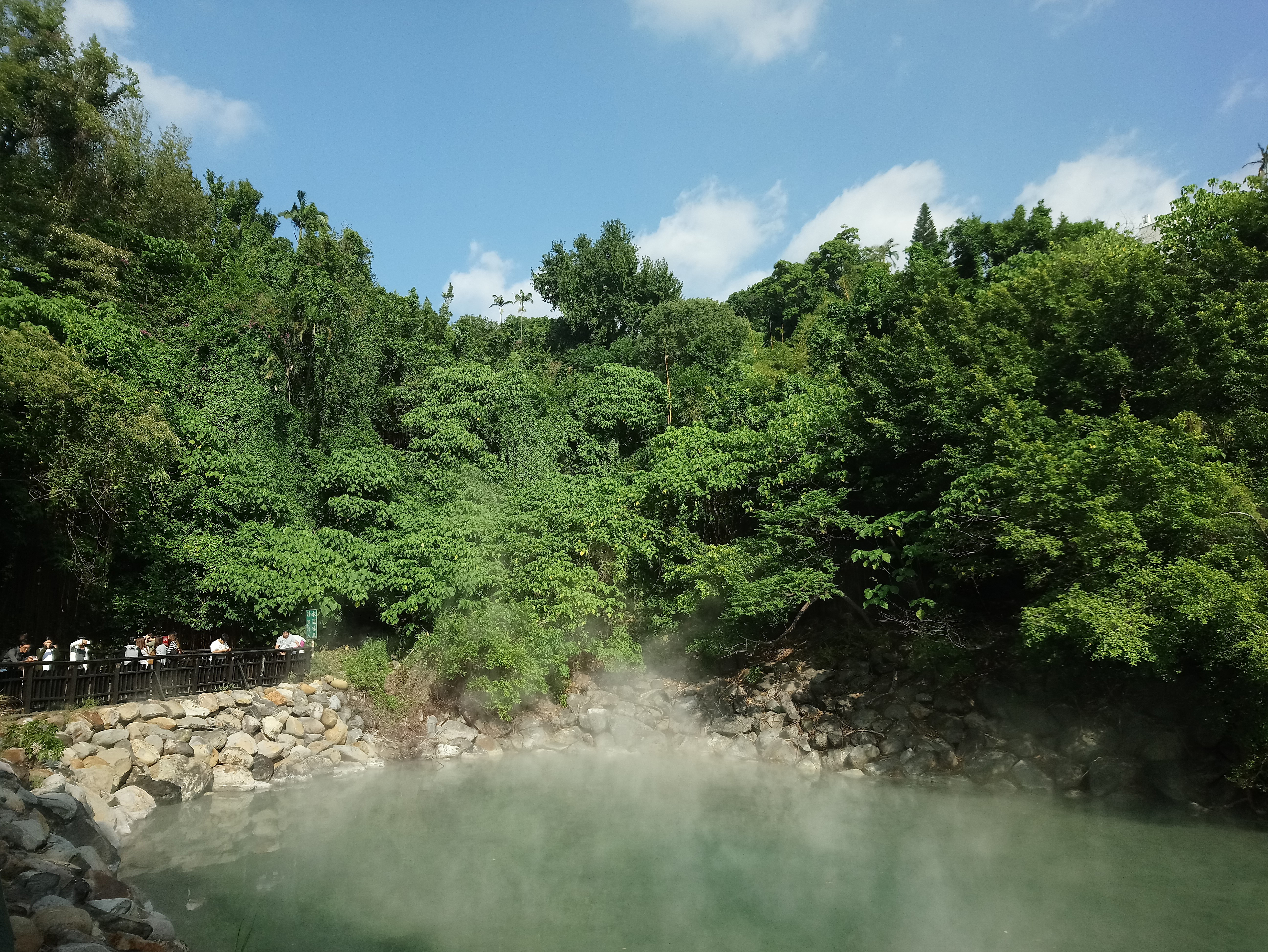 地熱谷,臺北市北投區新北投次分區林泉里